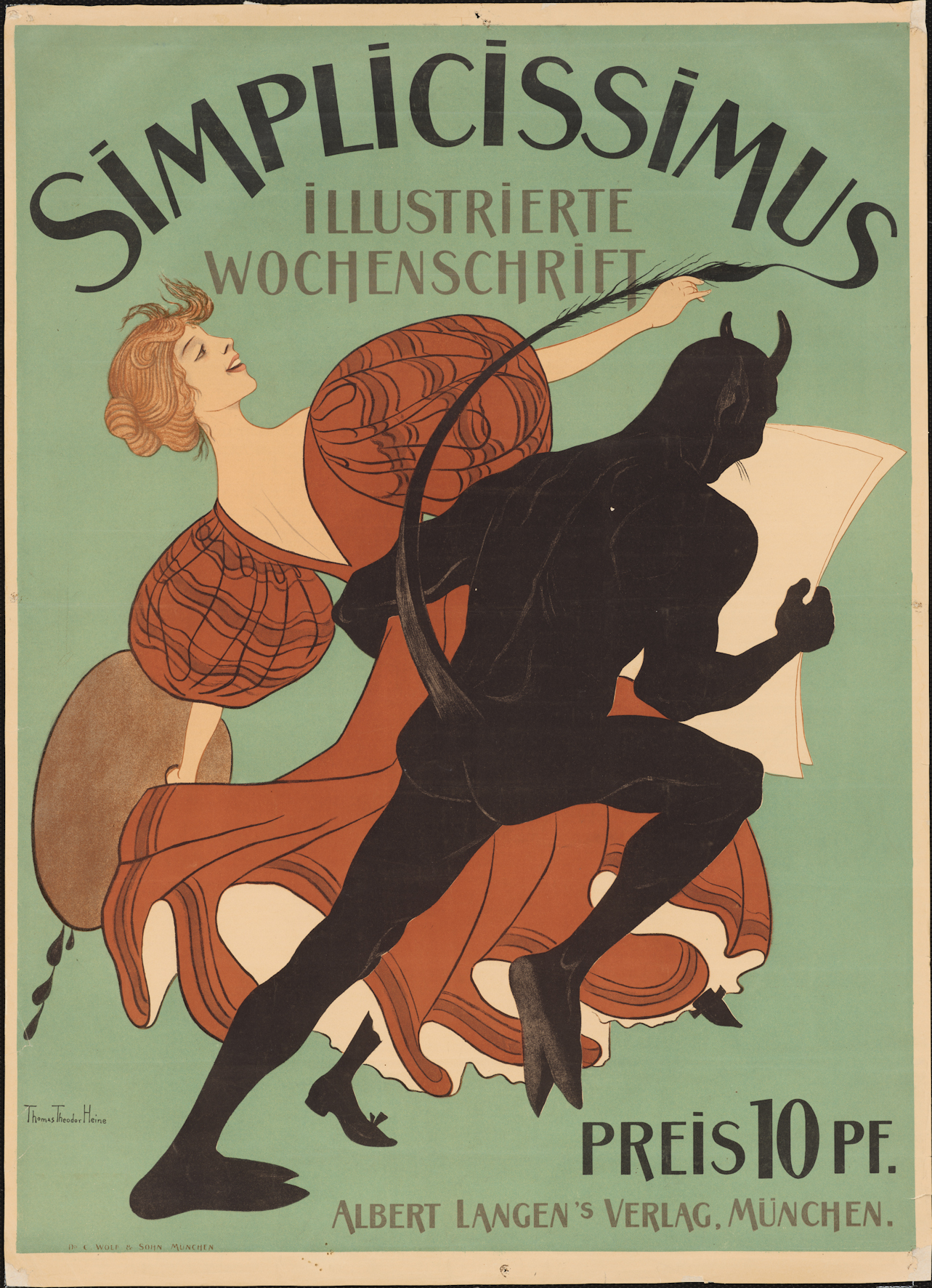 Im Rahmen ihrer vom 12. März bis 31. August 2013 gezeigten Ausstellung „Posters on media history“ bot das Deutsche Buch- und Schriftmuseum anlässlich der Einweihung des vierten Erweiterungsbaus der Deutschen Nationalbibliothek in Leipzig neben einer Presseerklärung in deutscher und englischer Sprache unter anderem hochaufgelöste gemeinfreie Plakate zum Herunterladen. Dieses Werk des Künstlers Thomas Theodor Heine aus dem Jahr 1896 wirbt für die im Albert Langen's Verlag München herausgegebene illustrierte Wochenschrift „Simplicissimus“ Der Vielfarbdruck - von der Deutschen Nationalbibliothek „Teufel tanzt mit hoher Kunst“ tituliert, wurde von der Universitätsdruckerei Dr. C. Wolf & Sohn in München hergestellt ...